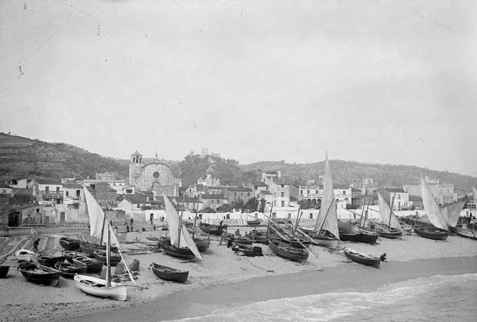 Imatge